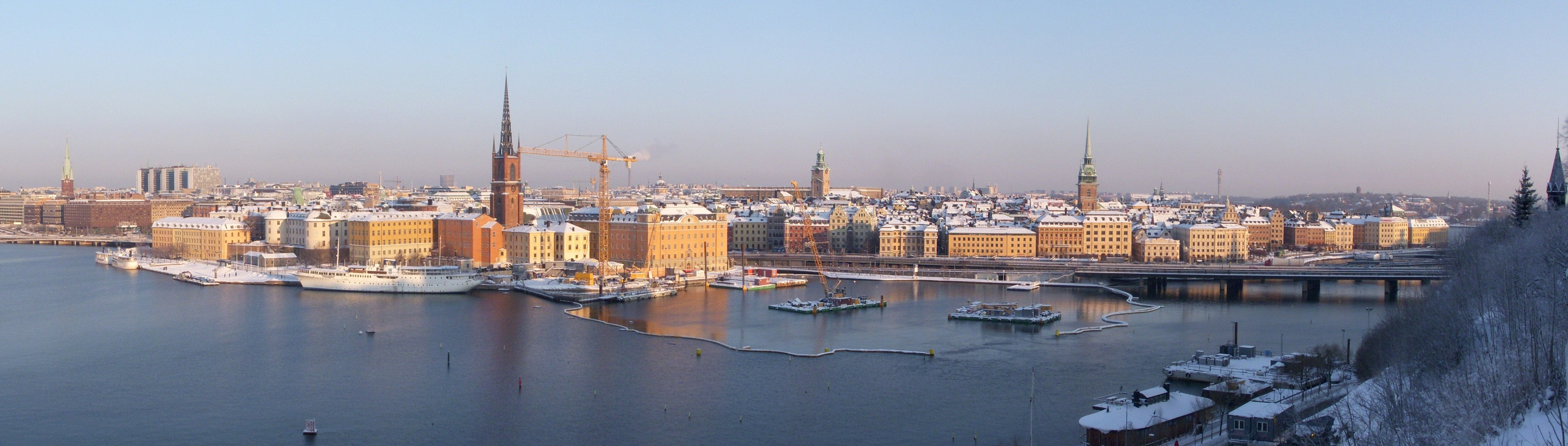 Monteliusvägen panorama